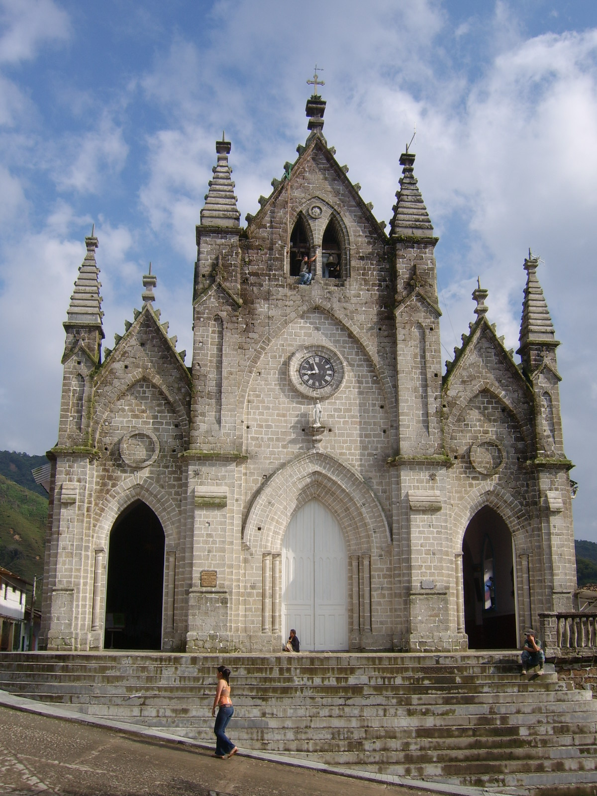 Iglesia de San Julian, Municipio de Argelia, Antioquia, Colombia.